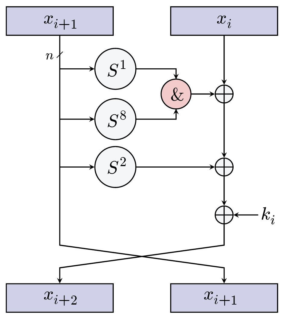 תיאור הפונקציה הפנימית של צופן Simon